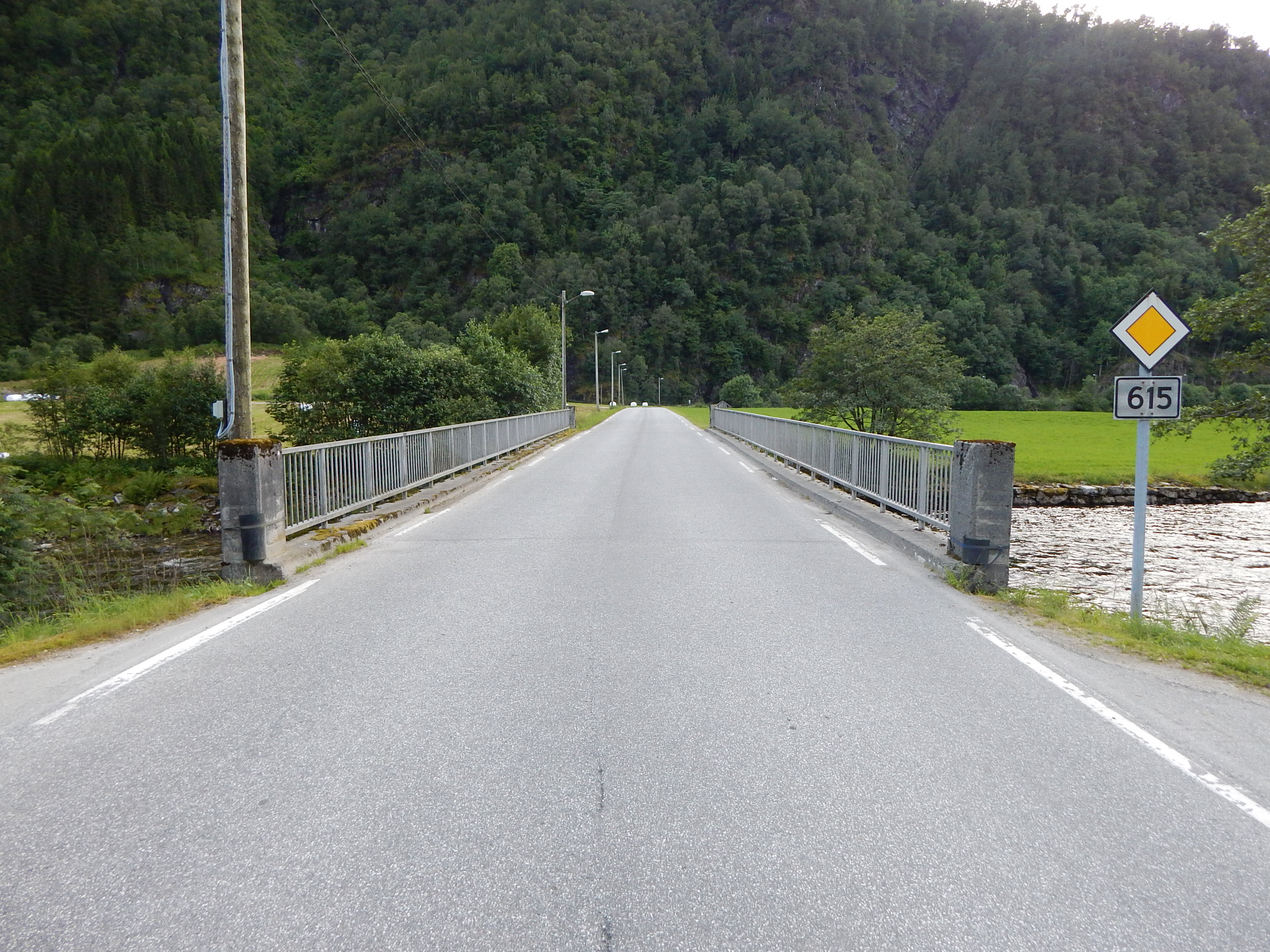 Fylkesvei 615 over Å bru i Hyen